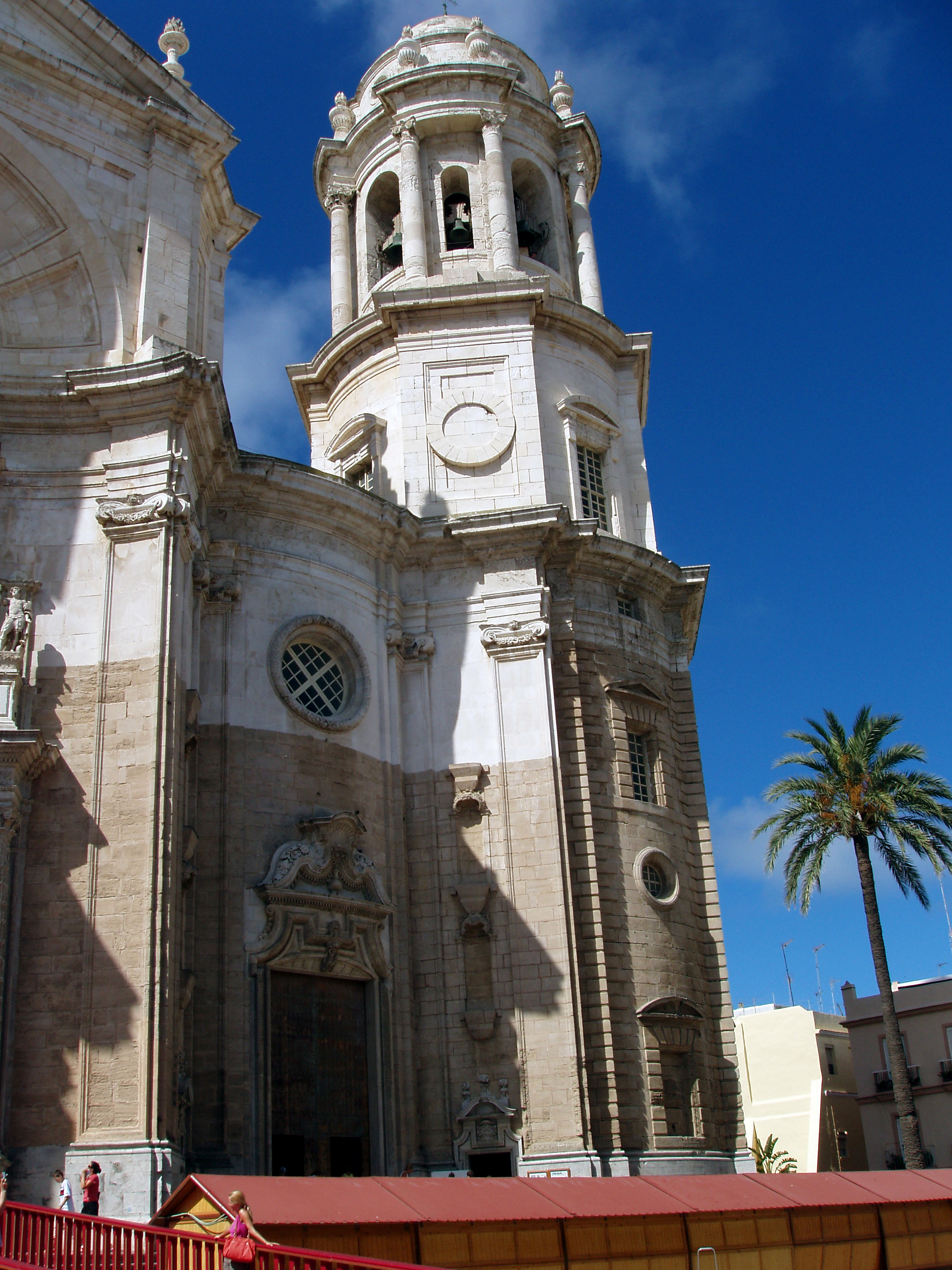 Catedral de Cádiz.